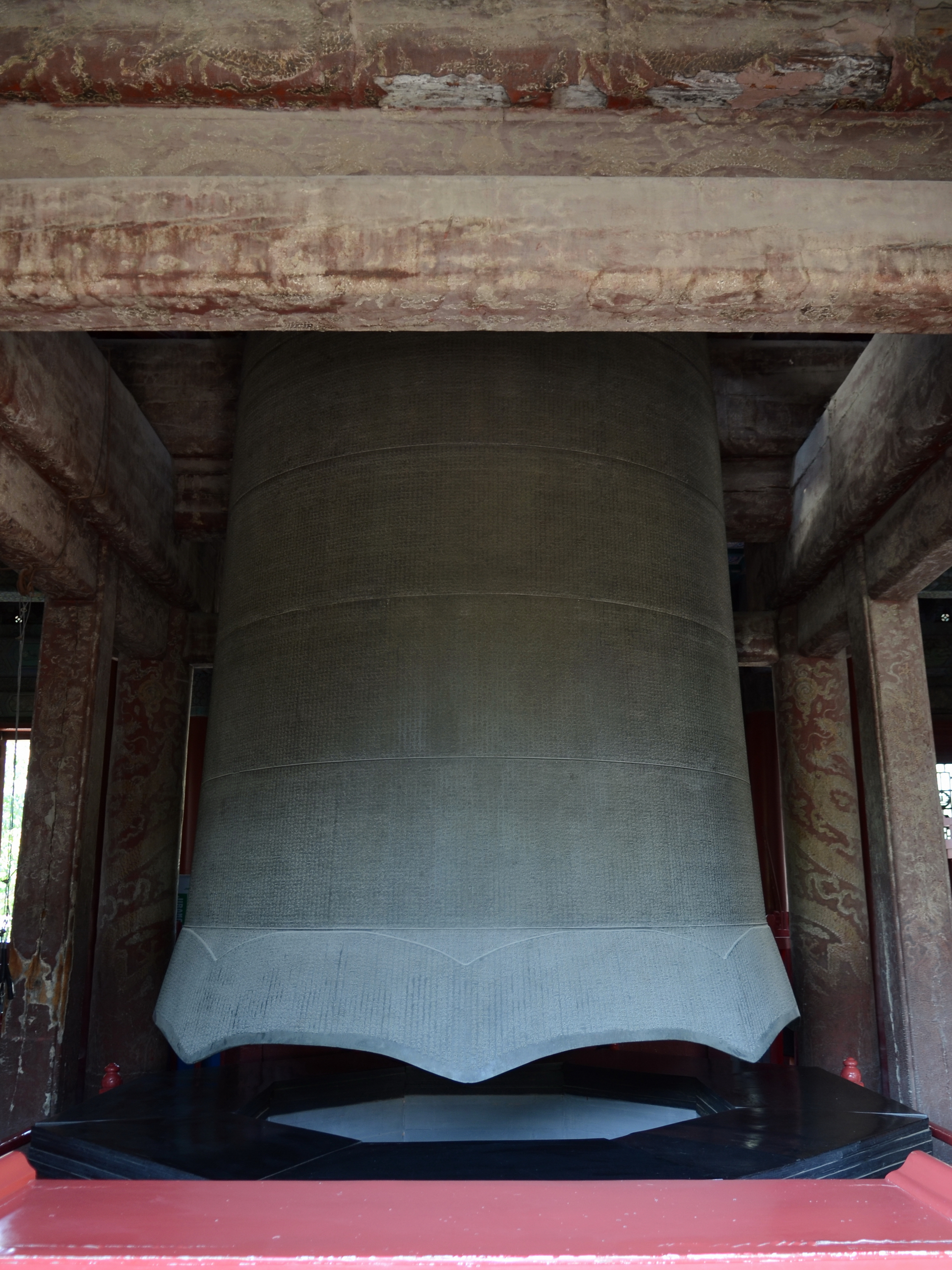 中文（中国大陆）: 永乐大钟，存放在北京大钟寺。